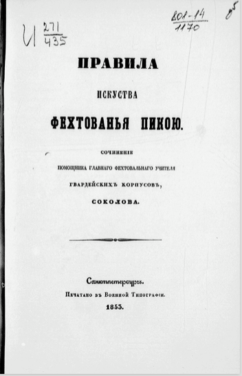 Обложка книги Соколова Н.В."Искусство фехтования пикой"